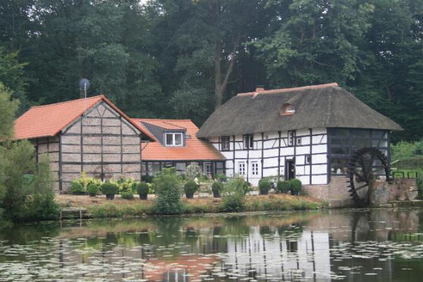 Ölmühle in Wegberg-Tüschenbroich